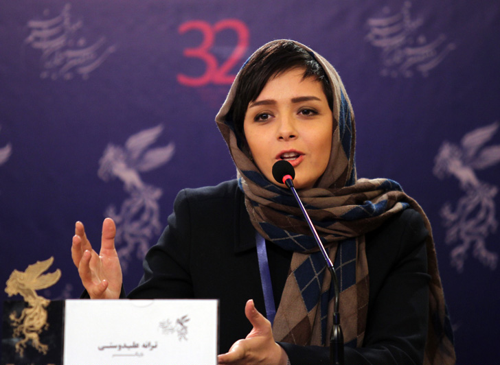 ترانه علیدوستی در نشست خبری فیلم سینمایی زندگی مشترک آقای محمودی و بانو